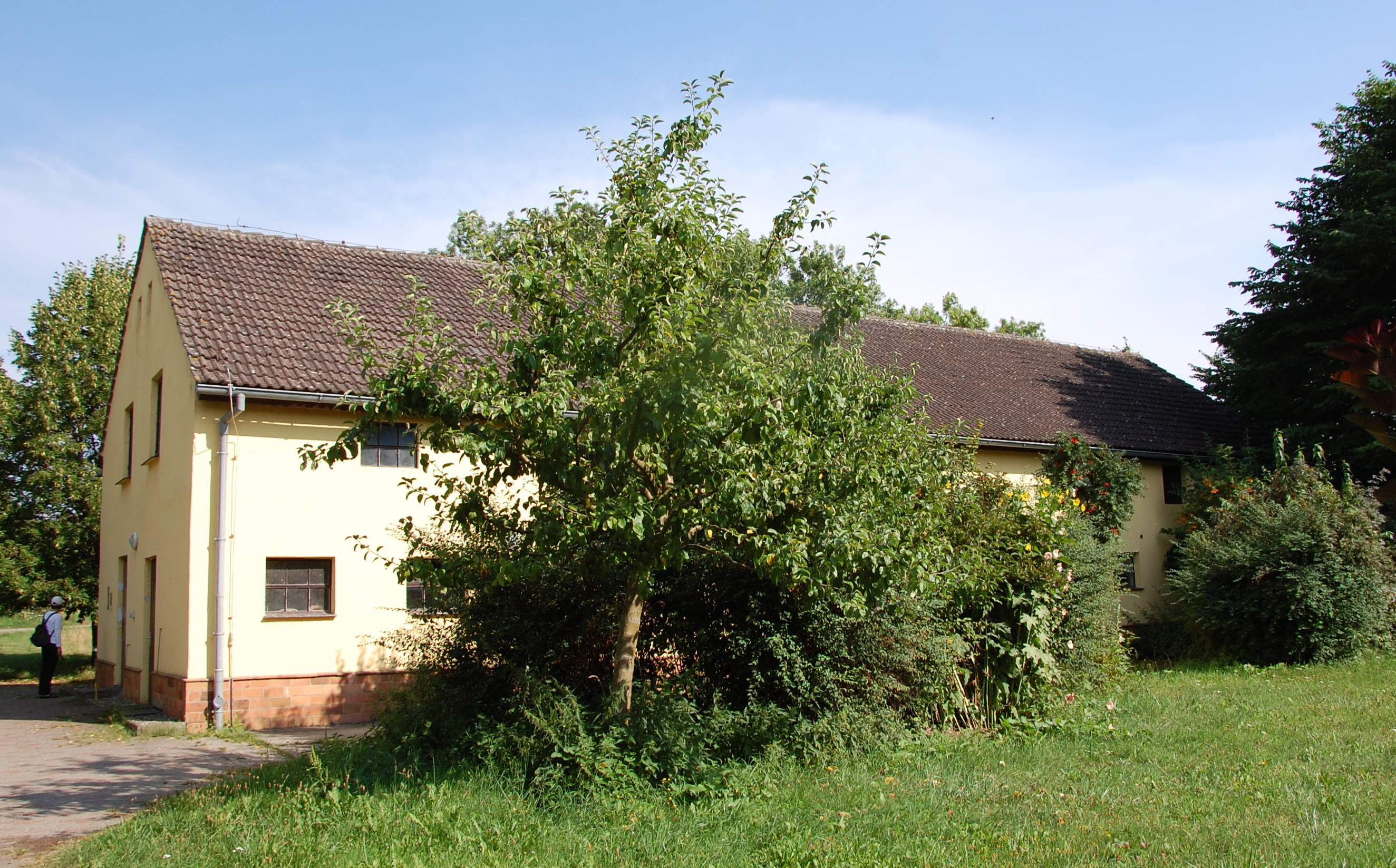 Vilm alter Stall